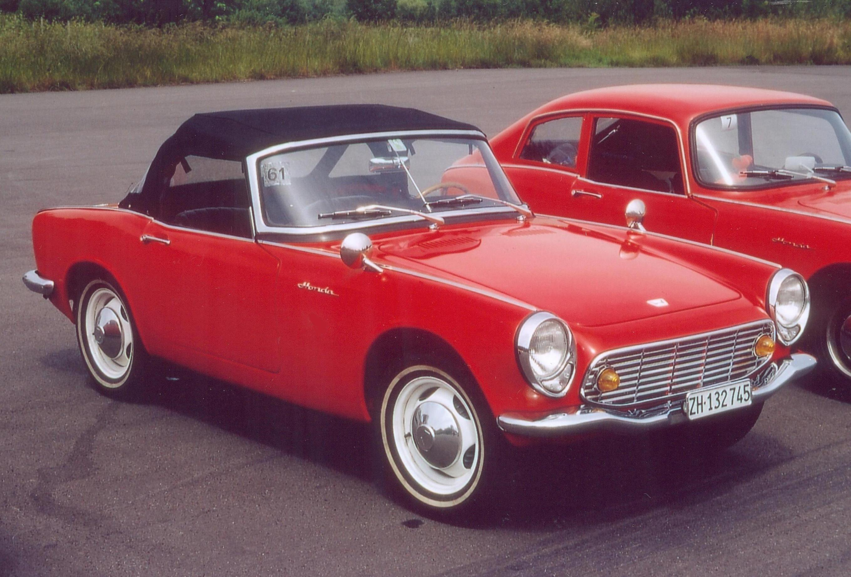 Honda S600 Cabrio closed